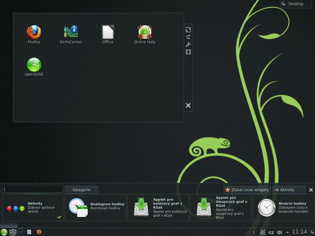 Snímek obrazovky z distribuce openSUSE Linux verze 12.3. Na snímku je plocha KDE Plasma Desktop.